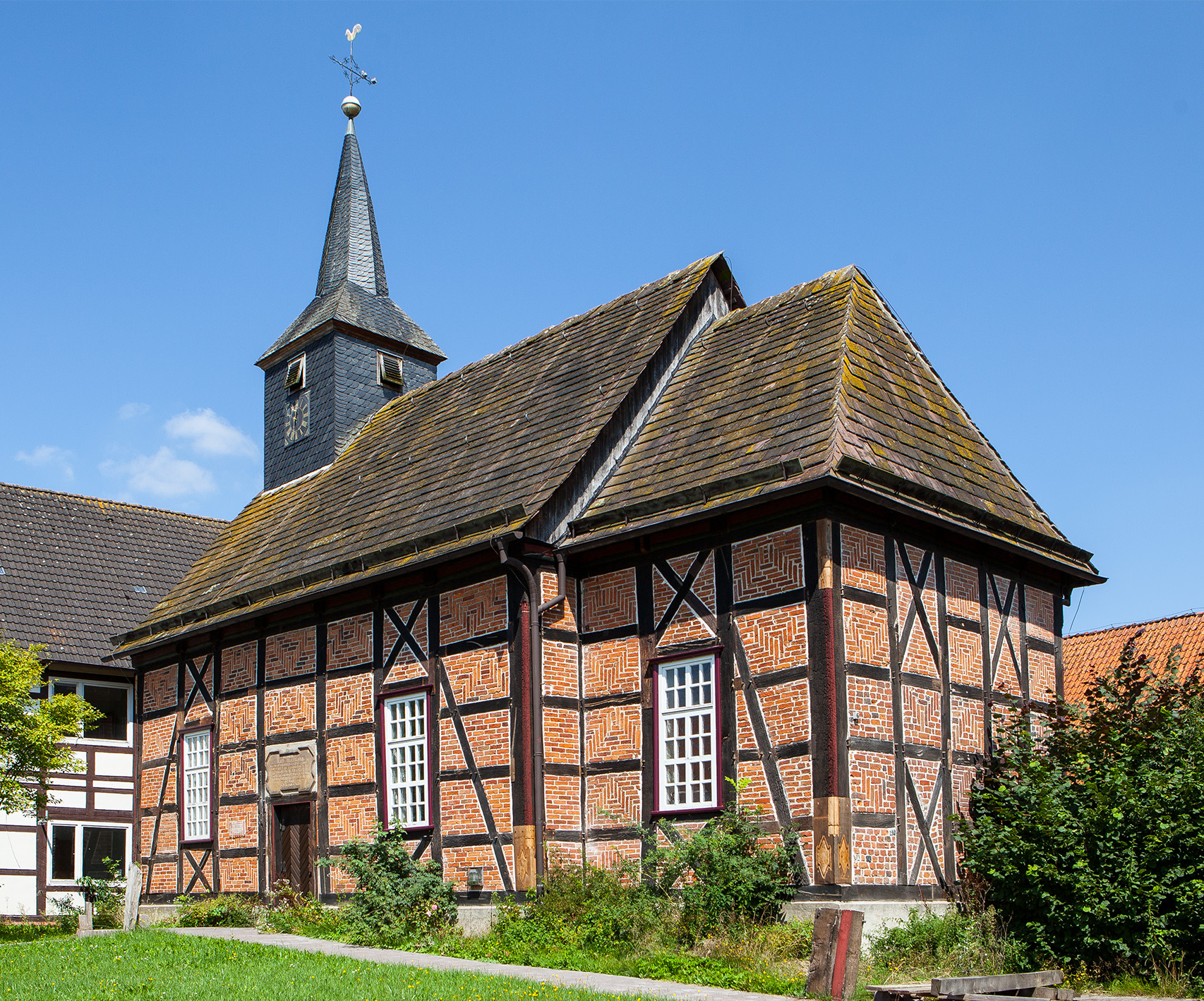 Evangelisch-reformierte Kapelle in Belle (Horn-Bad Meinberg).This is a photograph of an architectural monument. .01